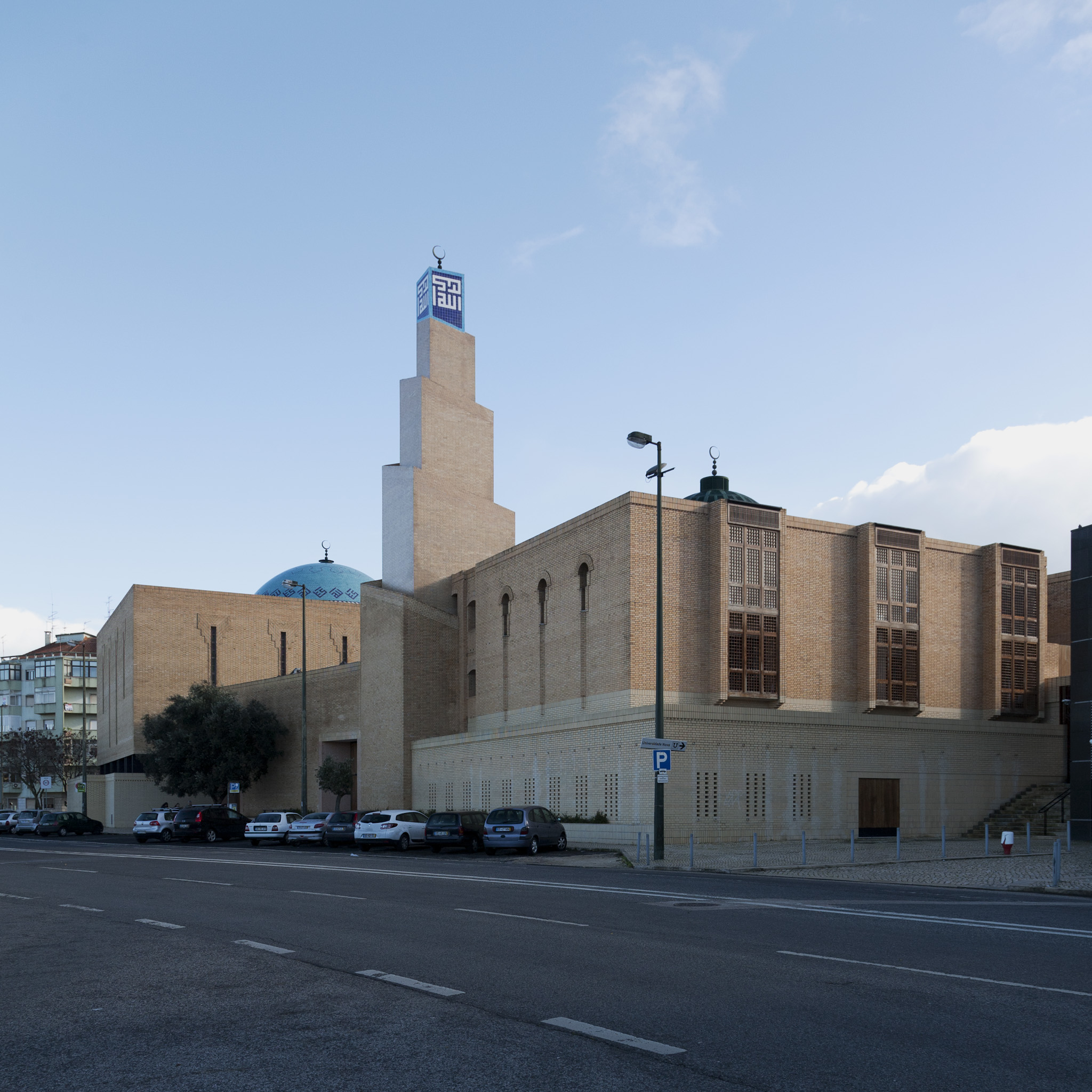 Mesquita Central de Lisboa; Arq. João Paulo Conceição